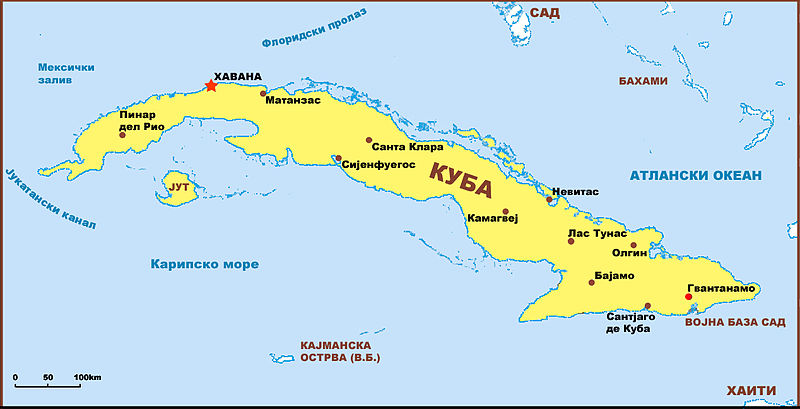 Аутор: Саша Костић Мапа Кубе Licensing